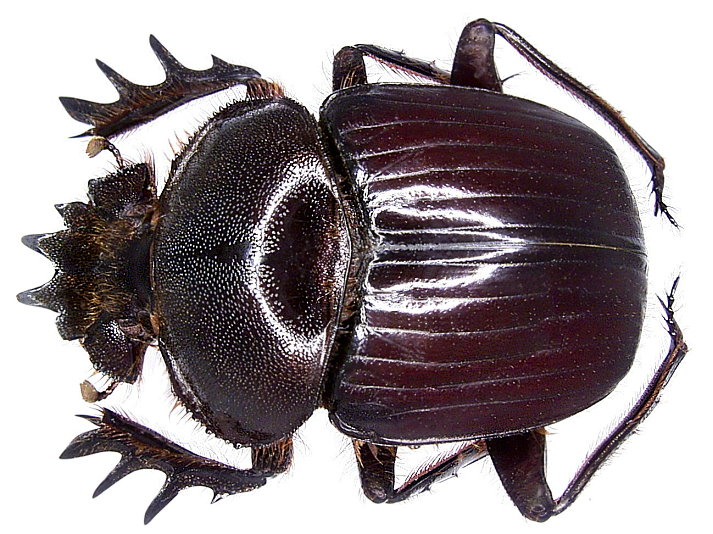 Familie: Scarabaeidae Grösse: 33-39 mm Fundort: Kenia, Tsavo National Park leg.det. U.Schmidt, 1991 Foto: U.Schmidt, 2006